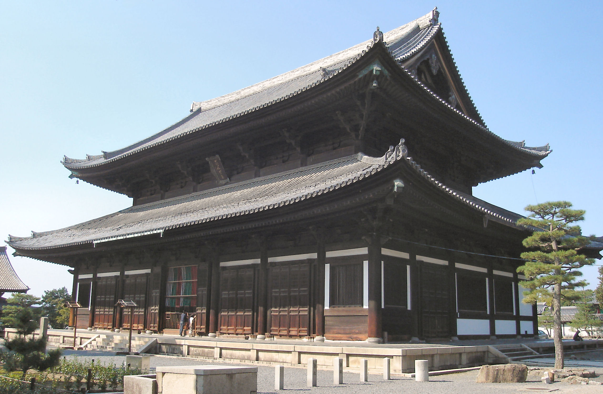 Tofukuji hondo